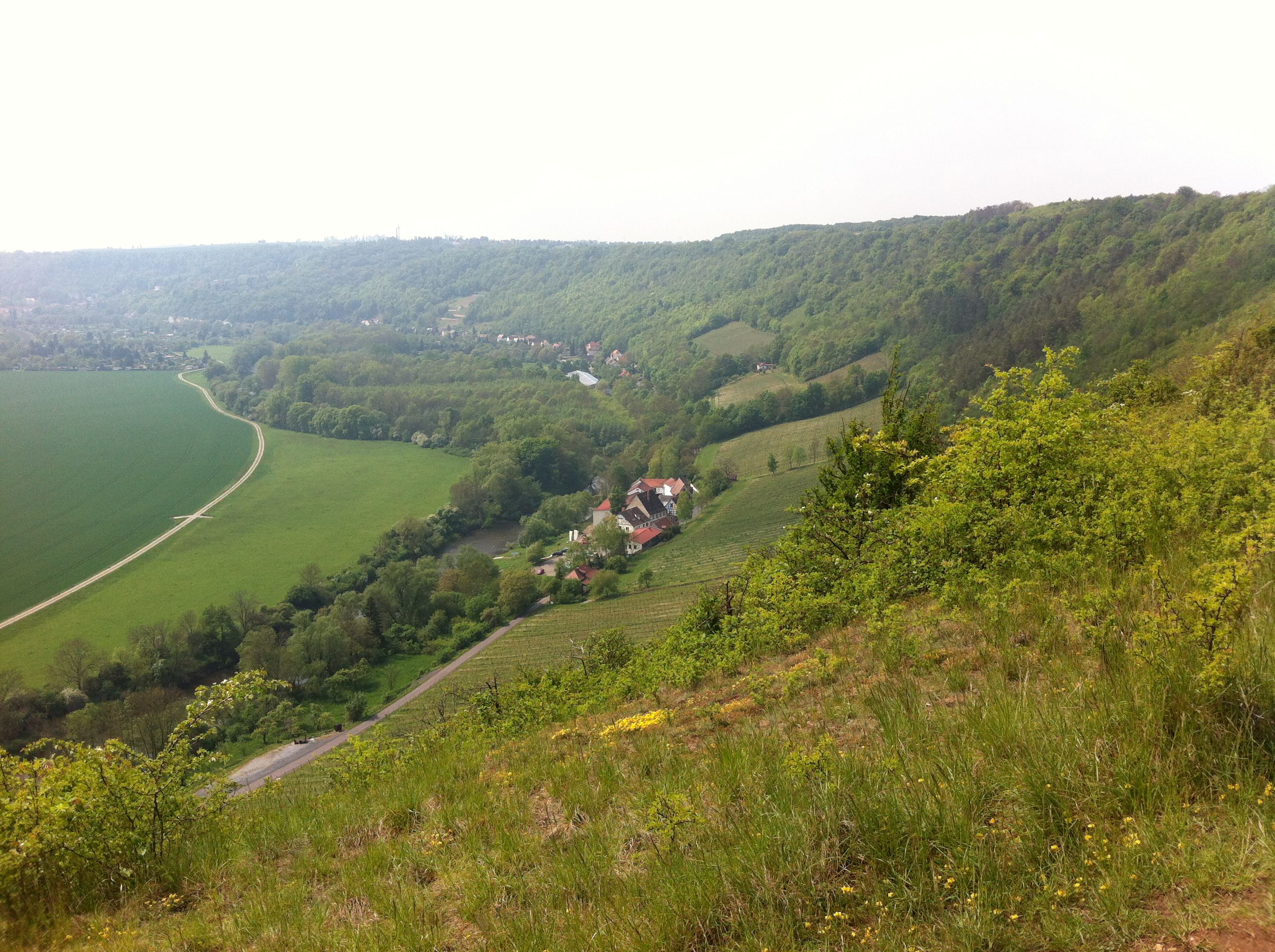 Naturpark Saale-Unstrut-Triasland; in der Bildmitte das Landesweingut Kloster Pforta an der Saale, Hangbereiche rechts im Bild weitgehend im Naturschutzgebiet „Göttersitz“